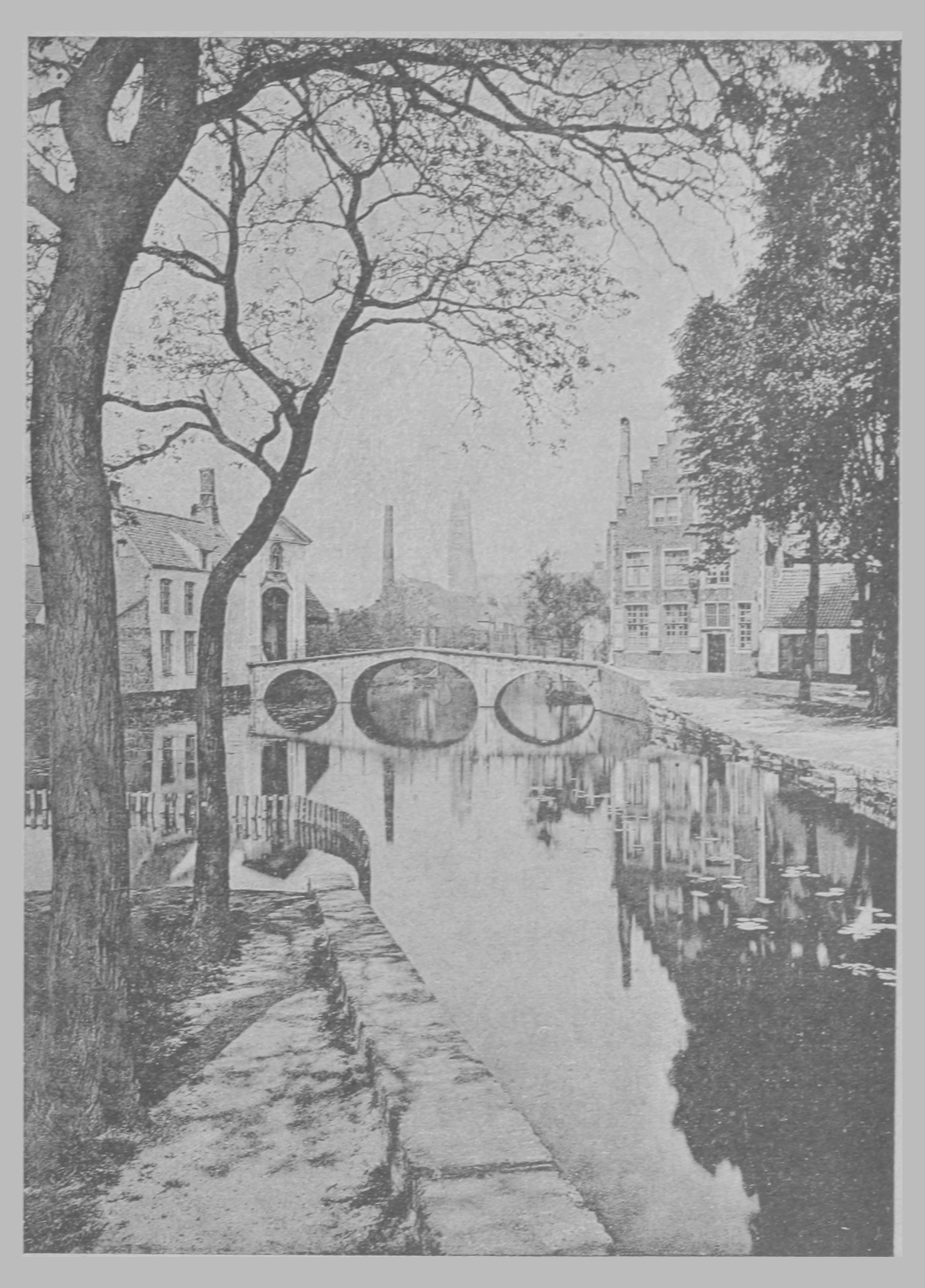 Bruges-la-Morte (Zicht op de Begijnhofbrug)